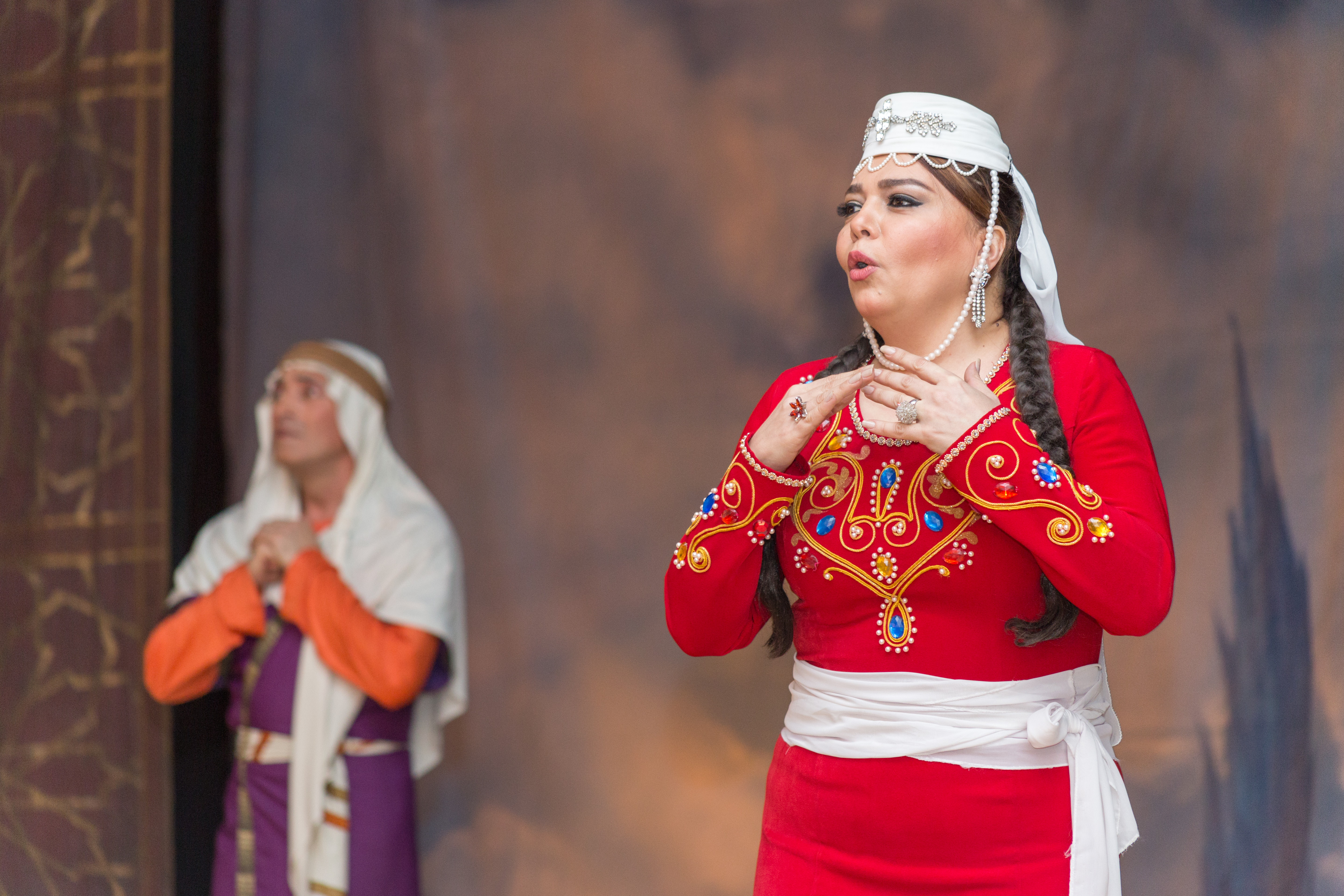 Baku opera and ballet theatre, Leyli and Majnun